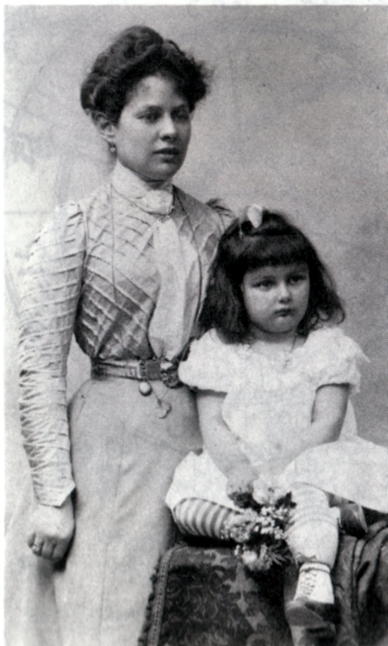 Zoe im Alter von 4 bis 5 Jahren mit ihrer Mutter Rosa, beb. Freiin von Krauß